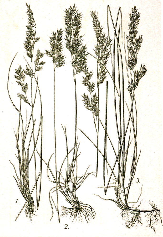 Original Caption 1. Amethyst-Schwingel, Festuca amethystina L. 2. Borsten-Schwingel, F. heterophylla Haenke 3. Roter Schwingel, F. rubra L.